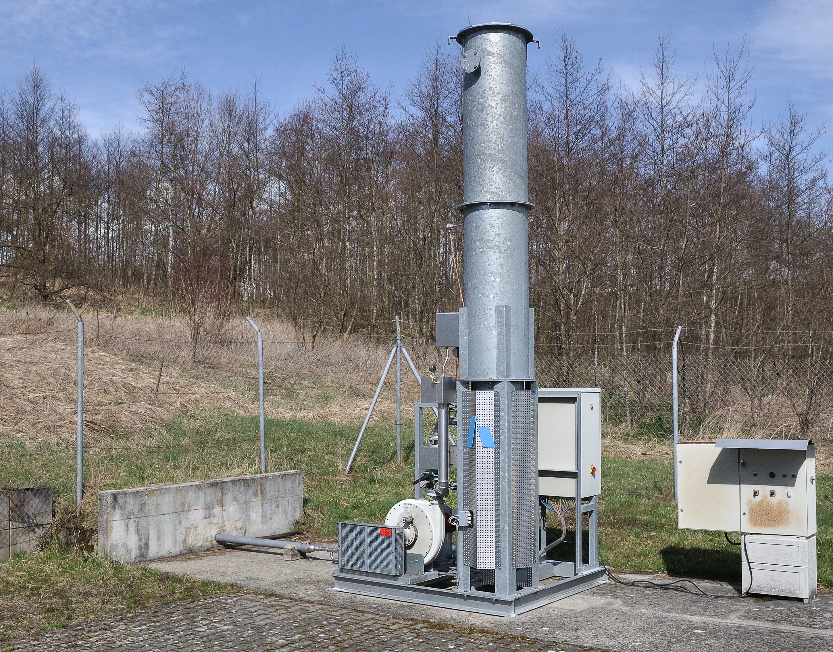 Kompaktentgasungsanlage mit Deponiegasfackel der Firma Hofstetter, Altdeponie Bermatingen, Bodenseekreis